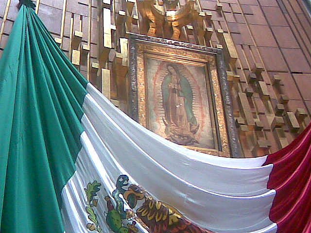 Conjunto Villa de Guadalupe